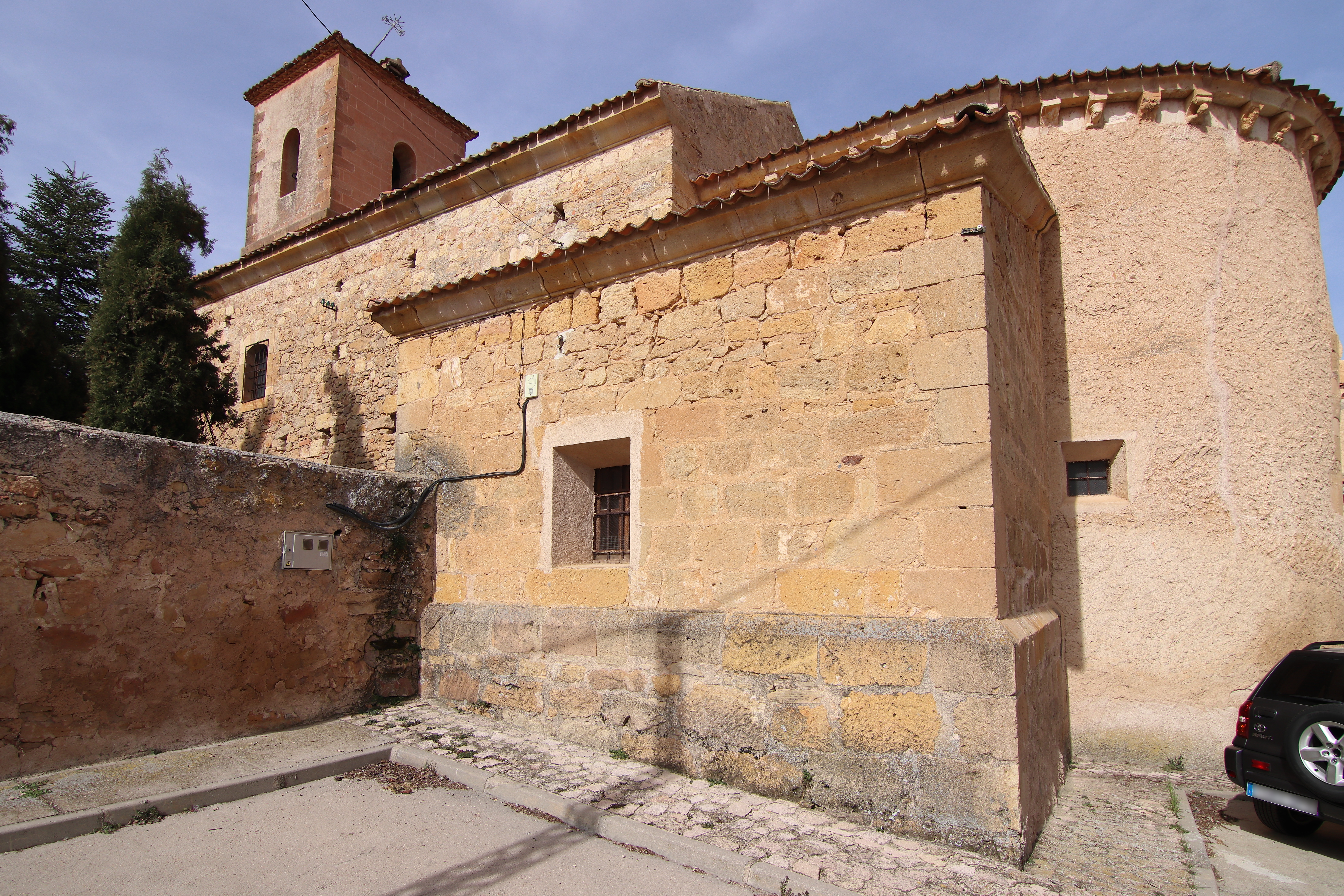 Iglesia Nuestra Señora de la Asunción, Adrada de Pirón, fachada sur